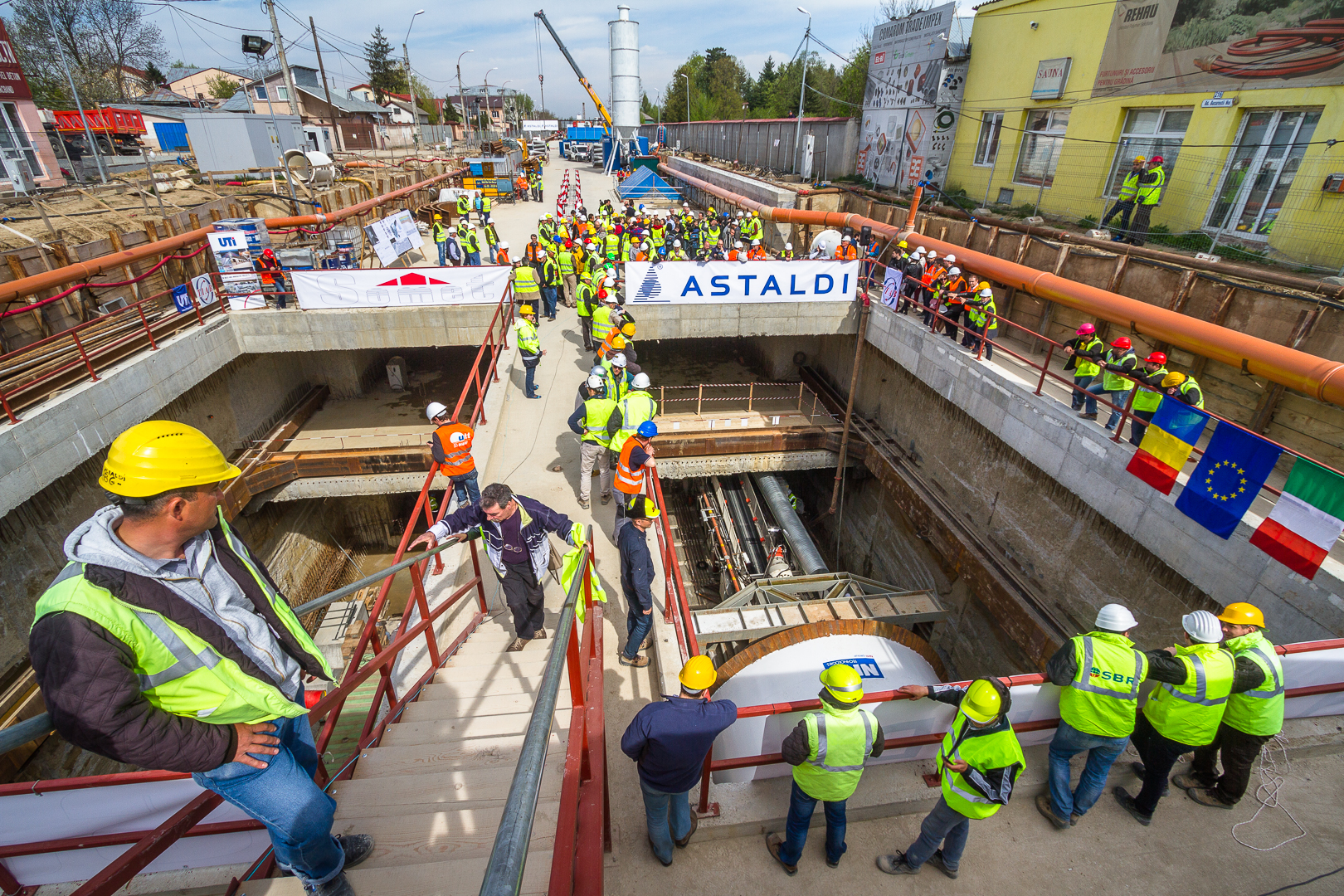 Santier Metrou - Statia Straulesti